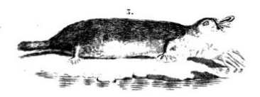 L'ornithorynque vu par George Cuvier